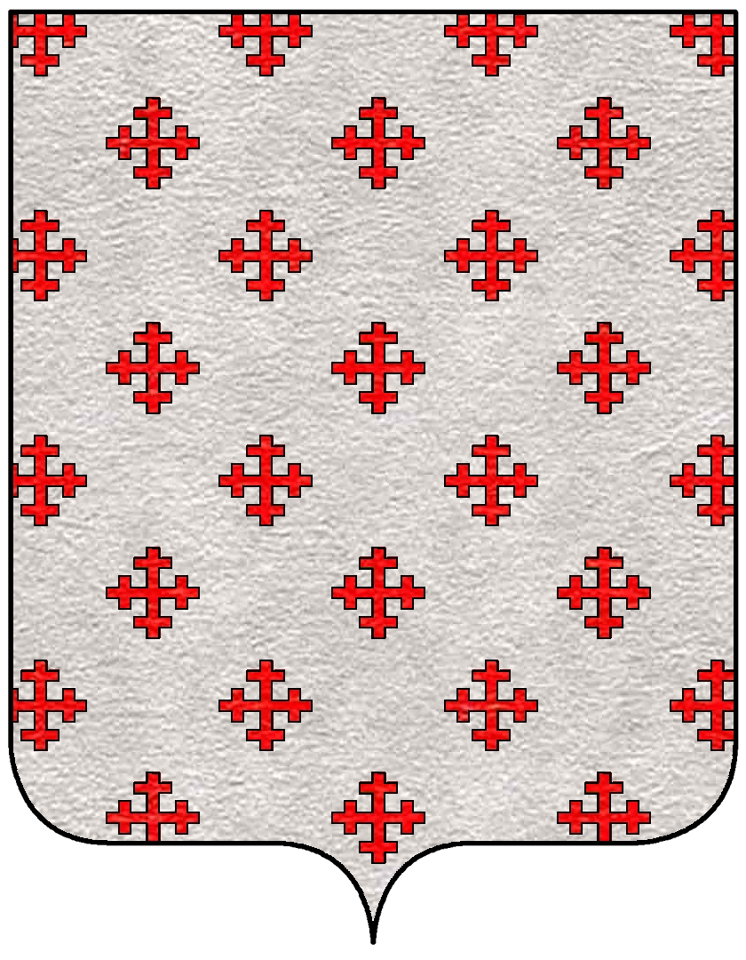 Stemma della famiglia Cavalcanti (Firenze)